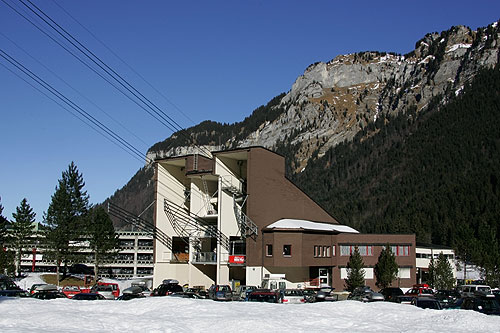 Hoch-Ybrig: Talstation der Luftseilbahn Weglosen-Seebli